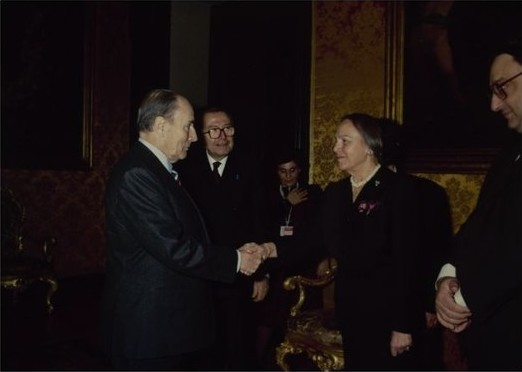 Conferenza dei parlamentari della Comunità europea, Nilde Iotti saluta Francois Mitterand